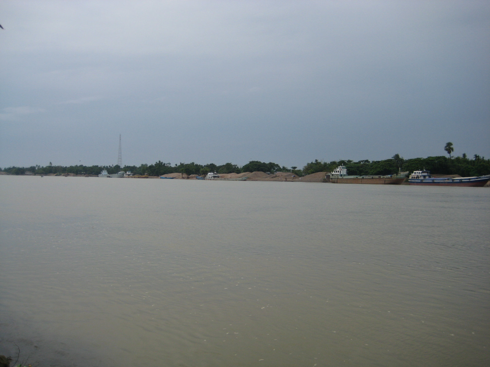 Surma River, Sunamganj, Sylhet, Bangladesh